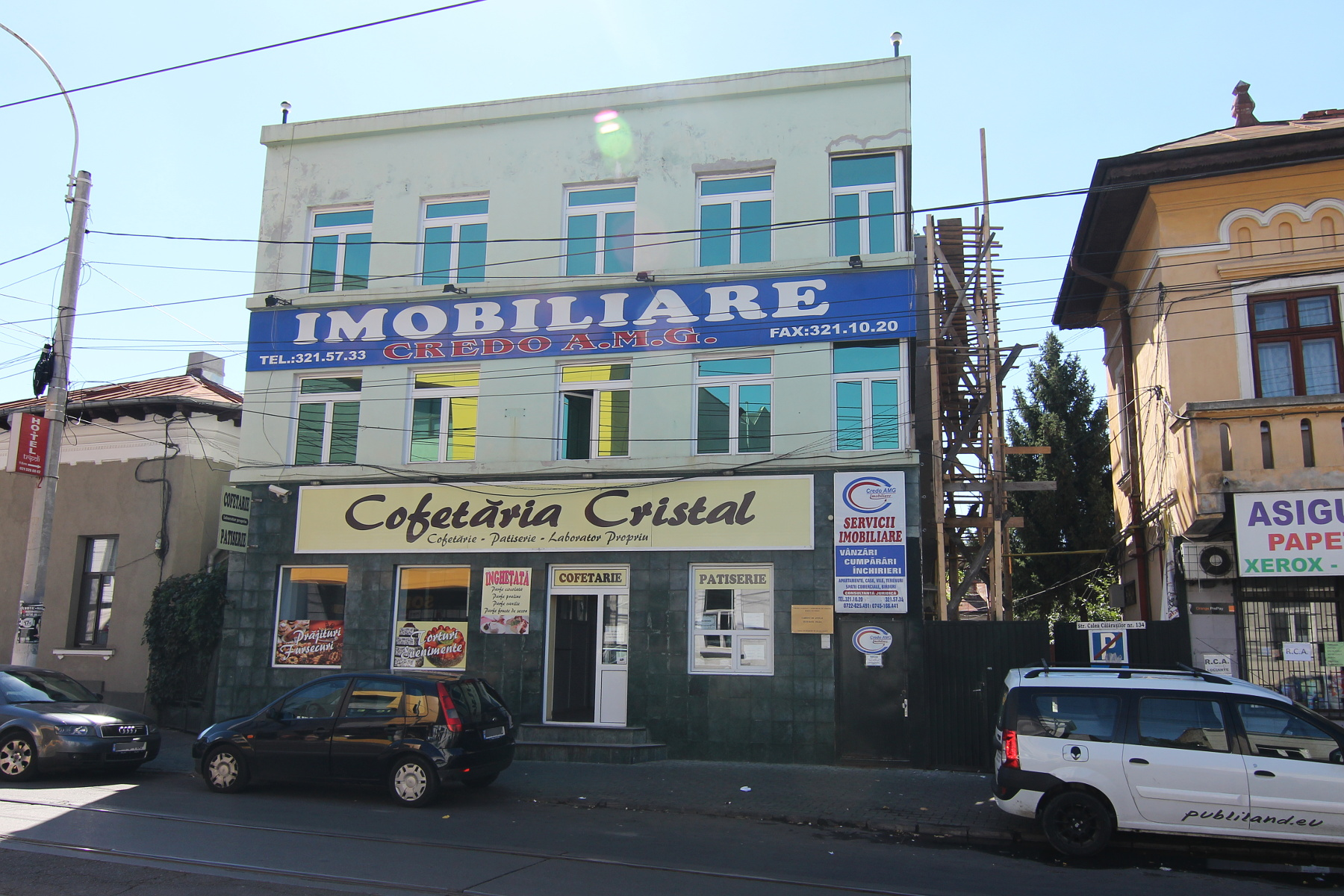 Casă pe Calea Călărașilor